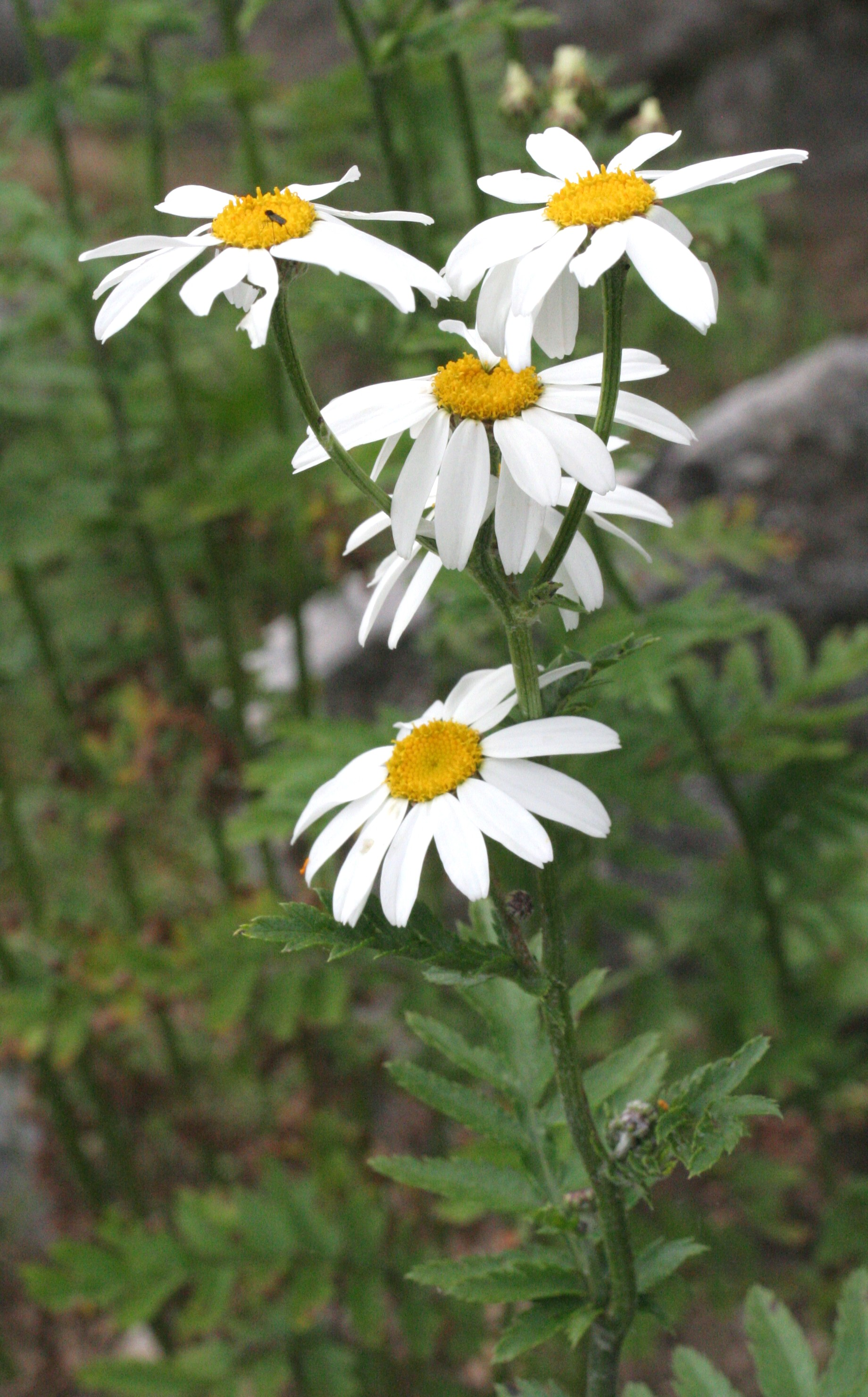 Tanacetum_corymbosum (Erba amara dei boschi) Località : Giardino Botanico Alpino "Giangio Lorenzoni", Pian Cansiglio, Tambre d'Alpago (BL), 1000 m s.l.m.